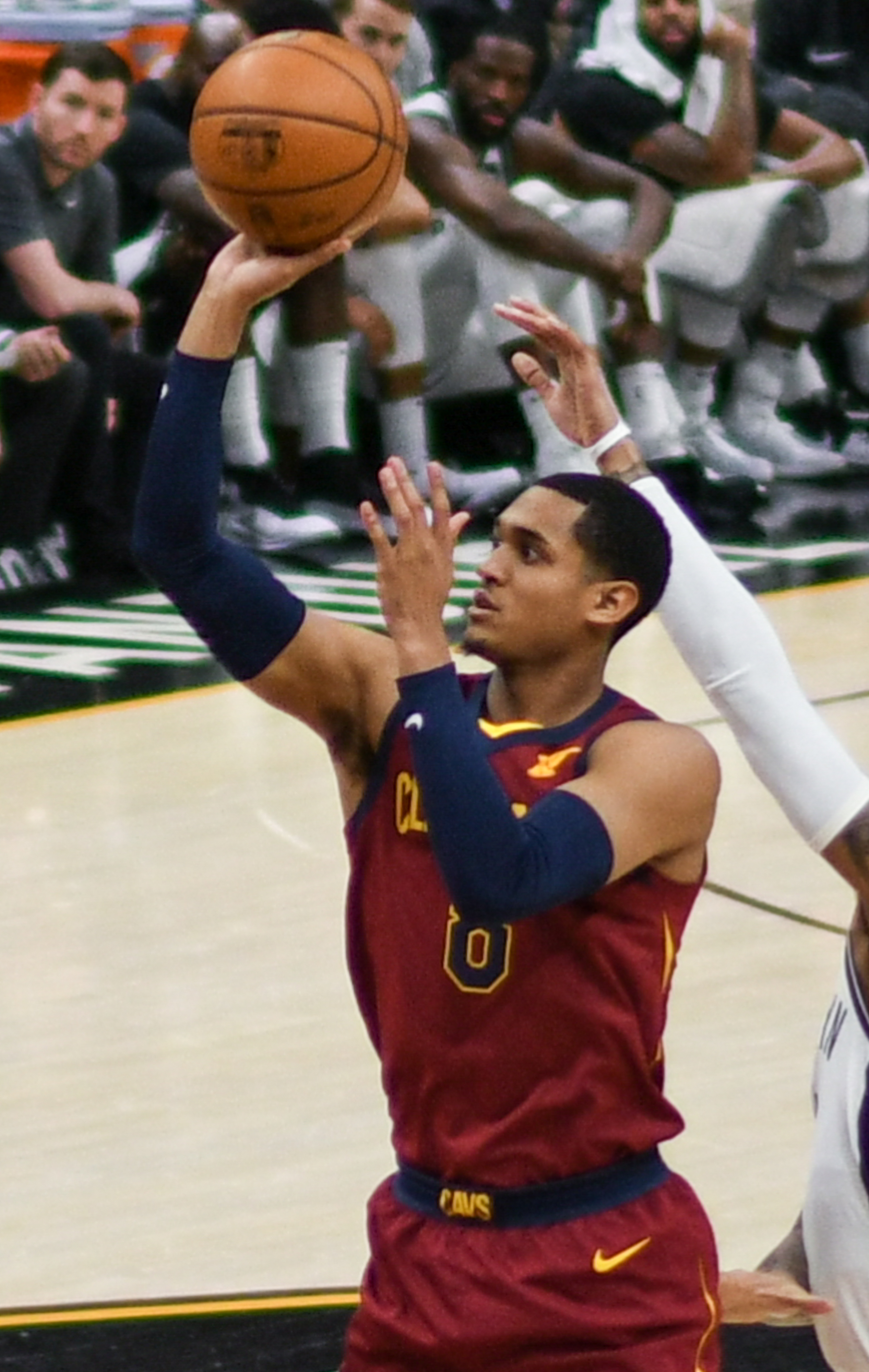 Jordan Clarkson